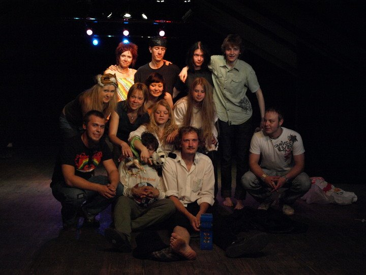 U.N.T.